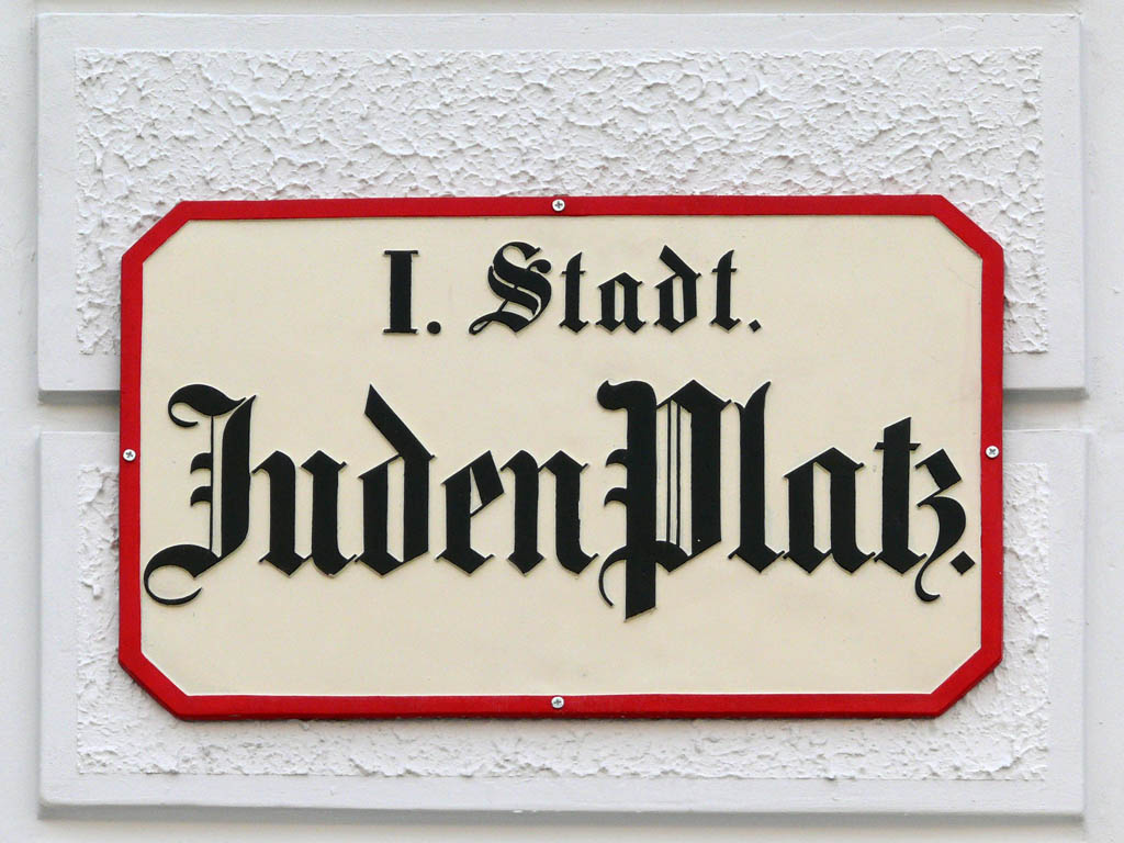 Judenpatz